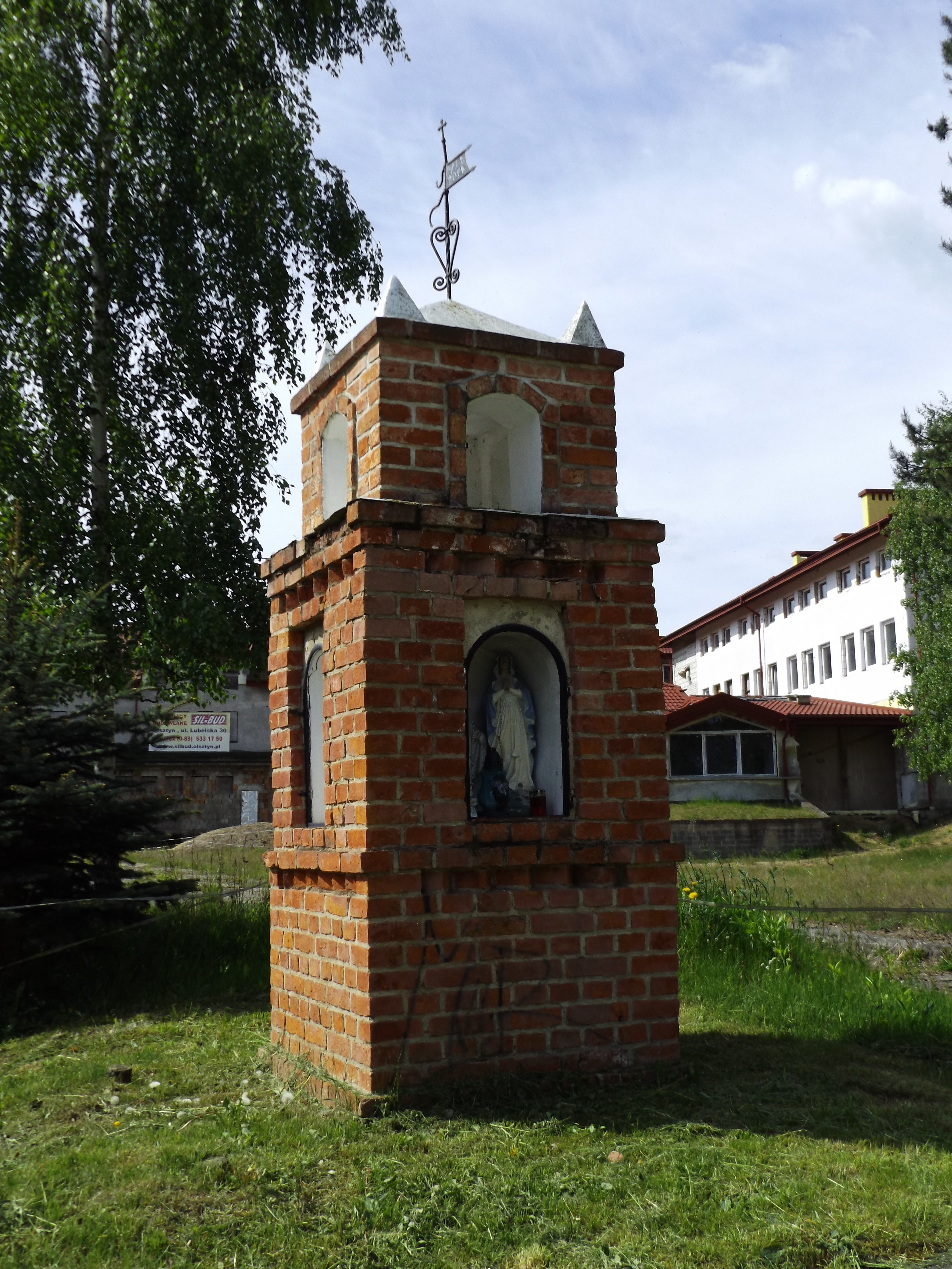 Kapliczka koło wsi Dorotowo